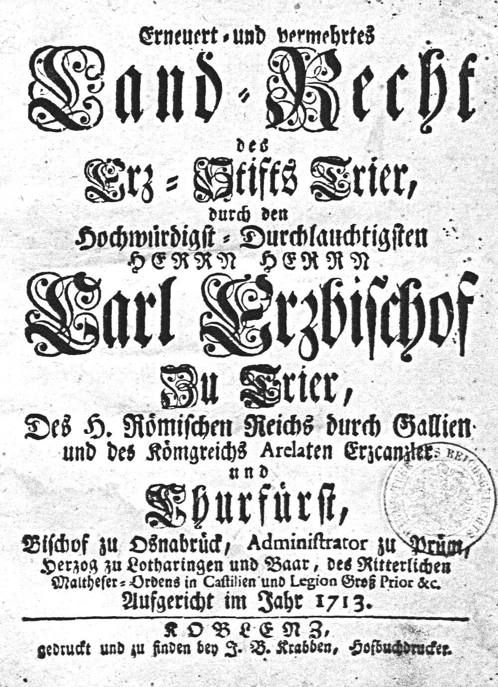 Buchtitel von 1713 Druckerei Krabben Koblenz